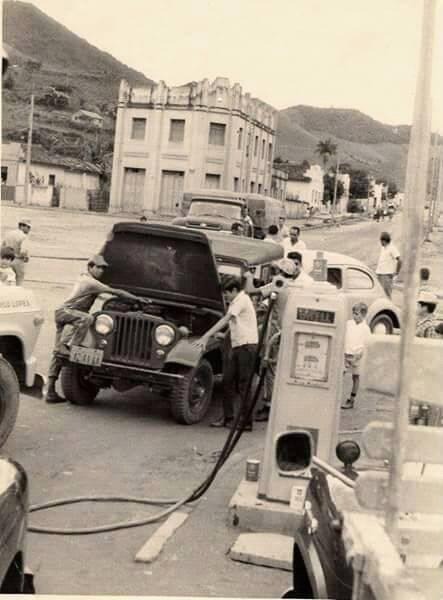 Foto do antigo Posto Shell em Espera Feliz. Ao fundo se vê o Educandário Sacramentino (Seminário). O posto se localizava onde hoje é a interseção entre as ruas João Sebastião de Amorim e a Henrique Gripp Filho.